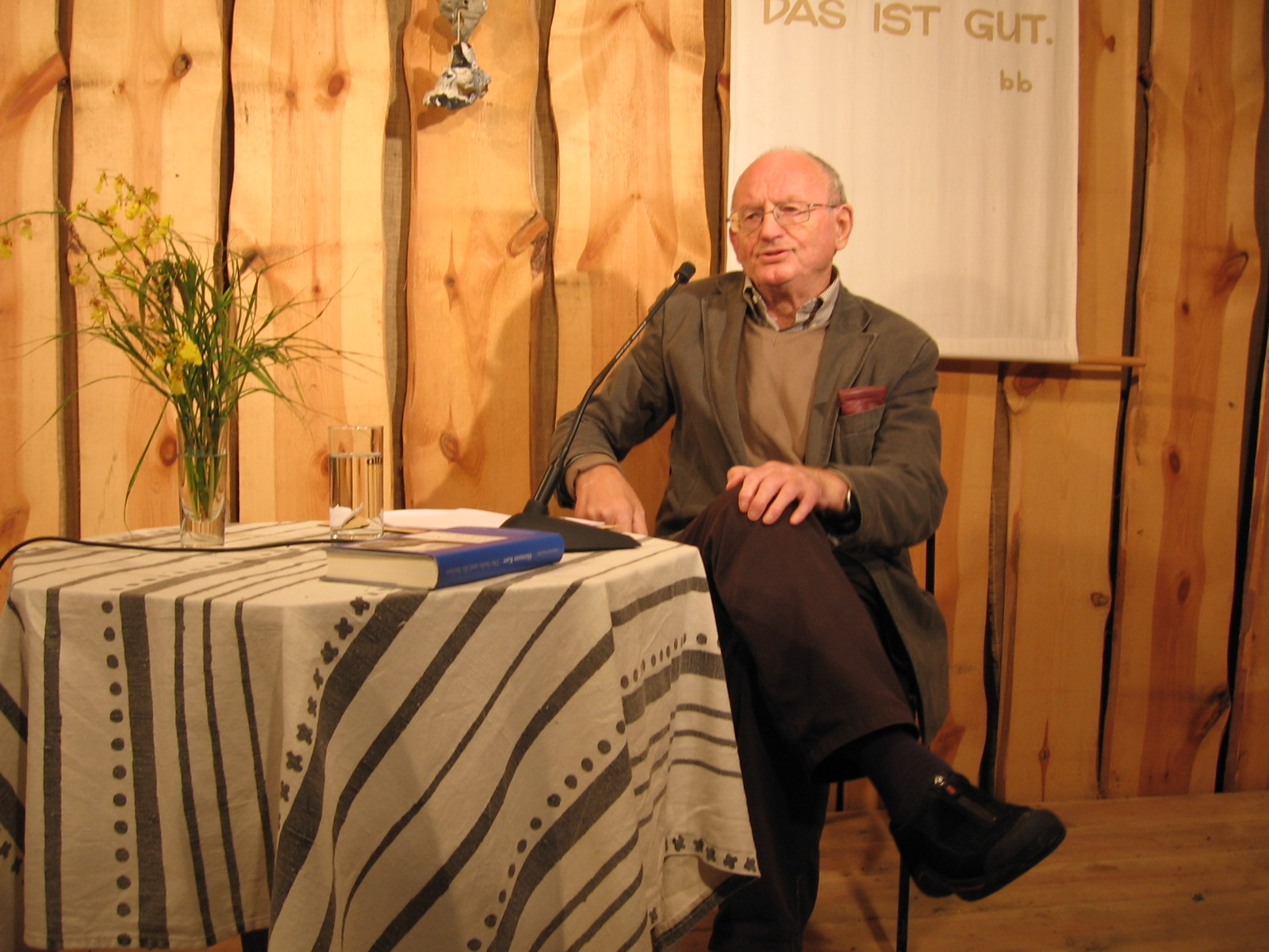 Hermann Kant bei seiner Lesung eines unveröffentlichten Romankapitels im Kulturstall, Userin